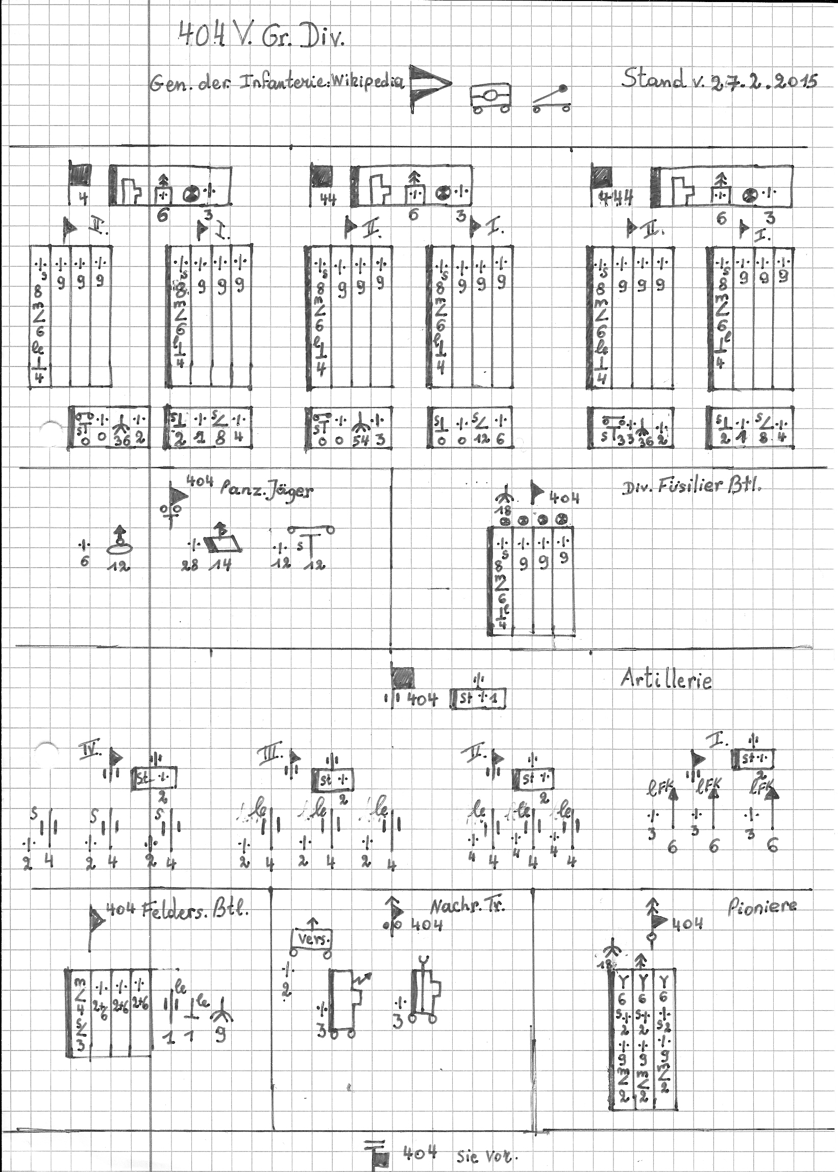 schéma théorique de l'organisation d'une division de volksgrenadiere